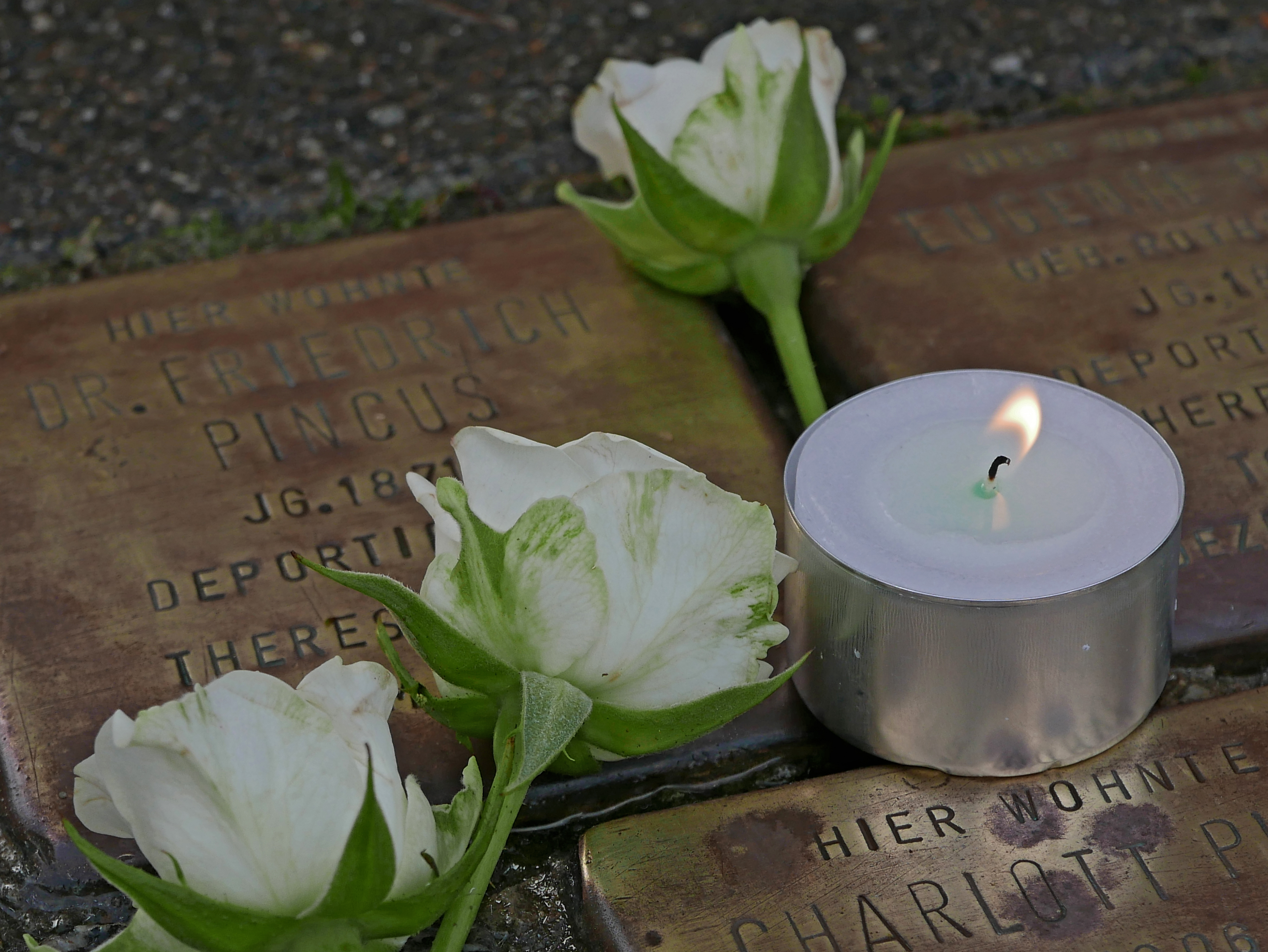 Stolpersteine für Familie Pincus am 09 November 2018 3